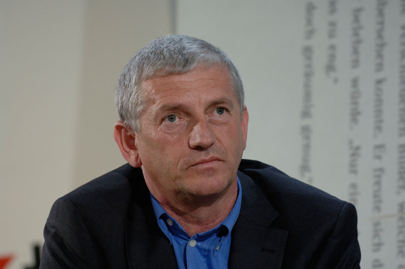 Arnold Stadler während der Frankfurter Buchmesse 2005.